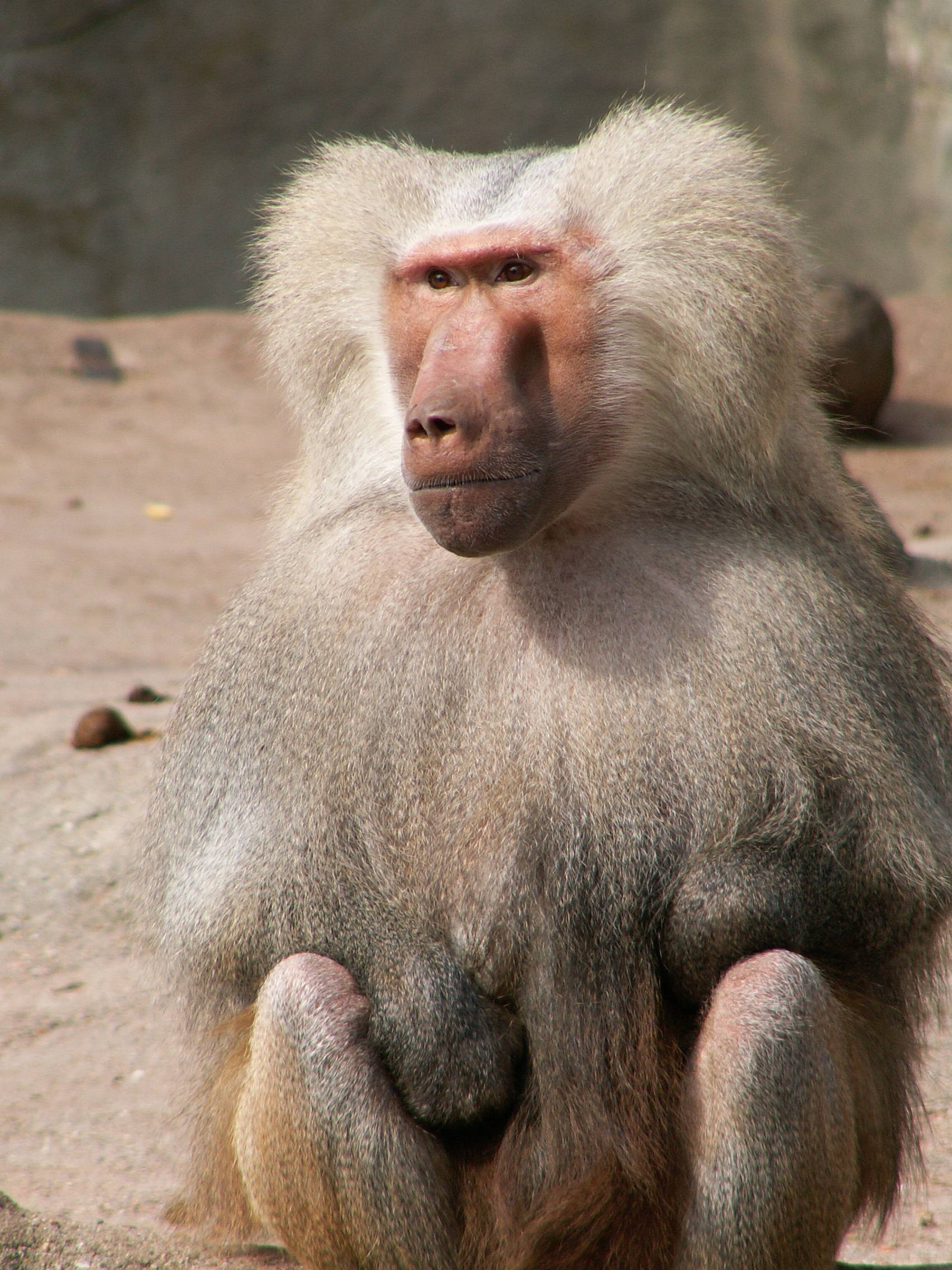 Papio hamadryas, Mantelpavian, adultes Männchen, aufgenommen in Hagenbecks Tierpark, Hamburg, Deutschland